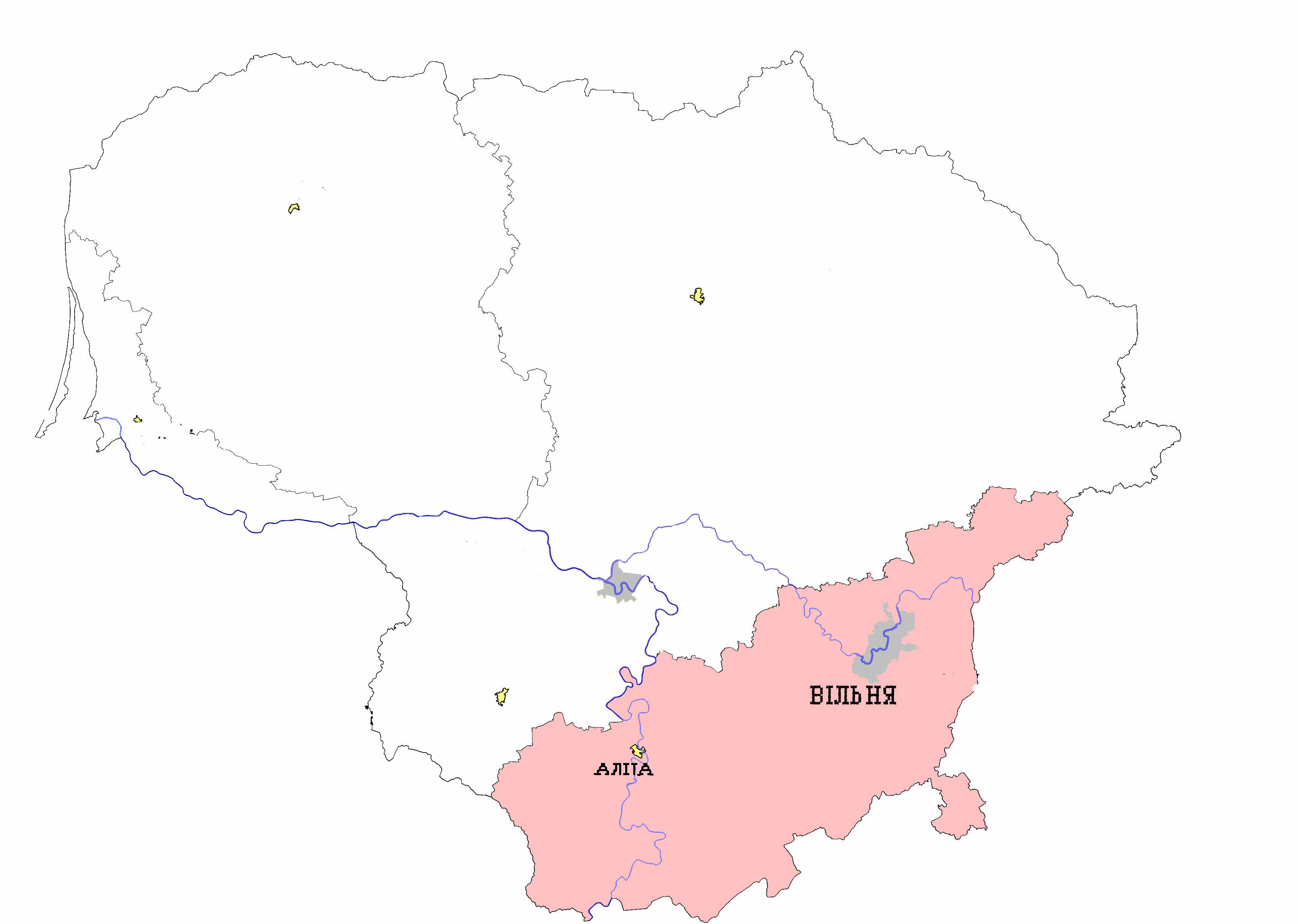 Беларуская (тарашкевіца): Мапа Дзукіі